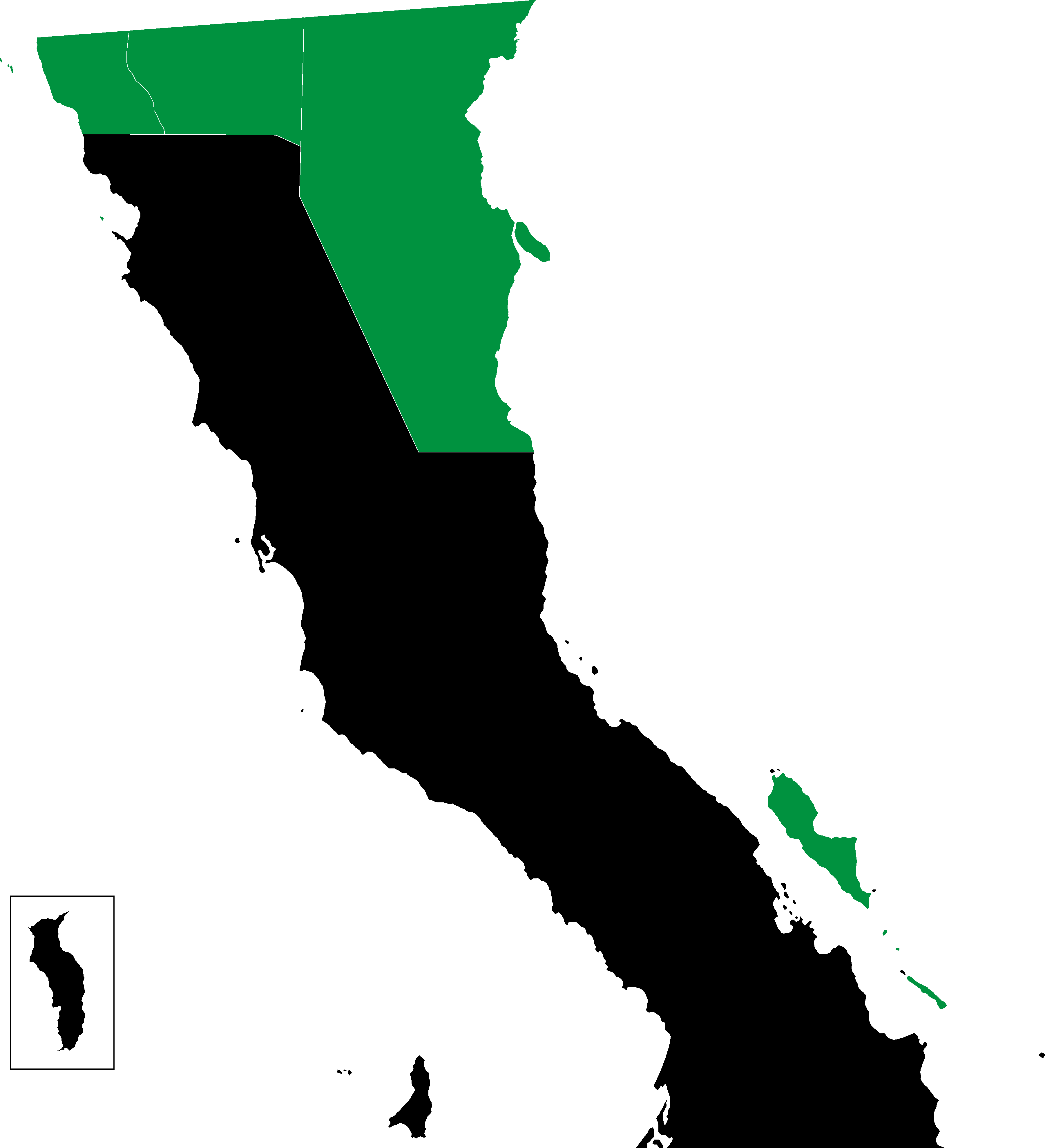 Resultados de la elección a Ayuntamientos por partido político en el estado de Baja California, México en 1983